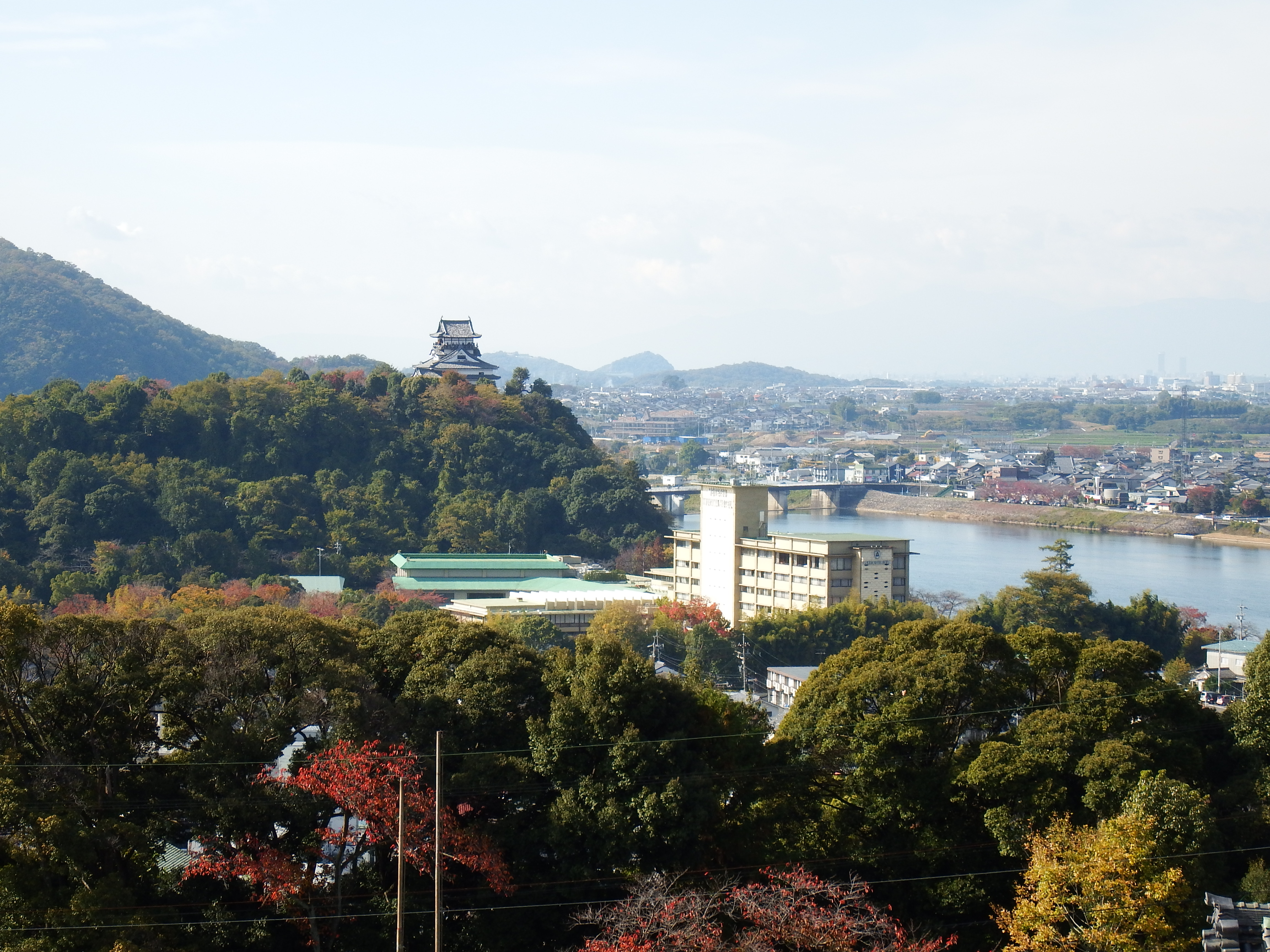 本堂から犬山城を望む